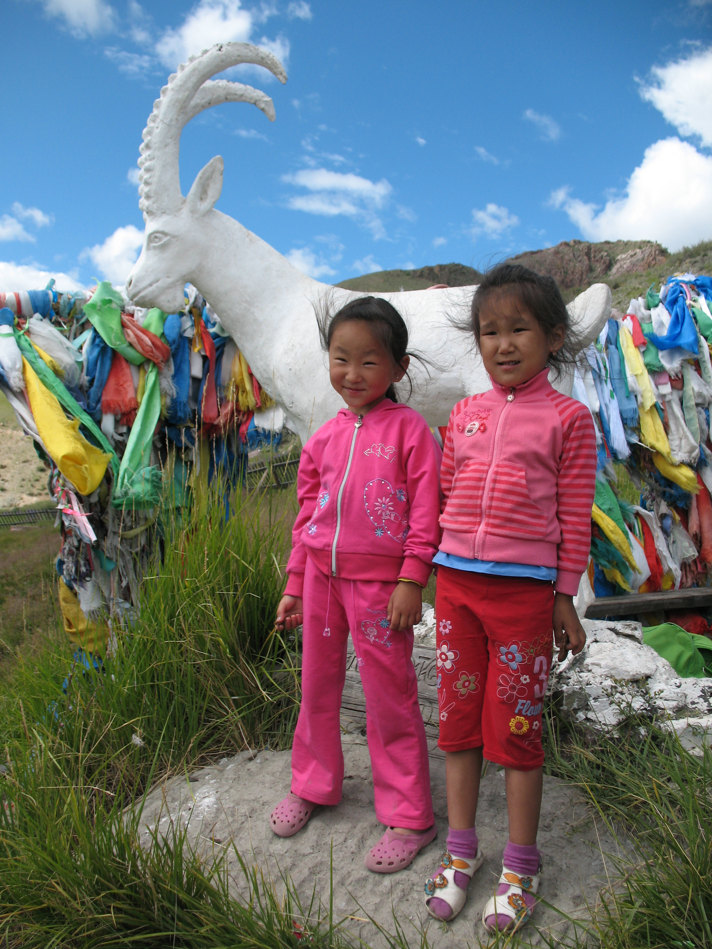 Тыва дыл: Бел аржаанның дагылга черинде турар теге тураскаал